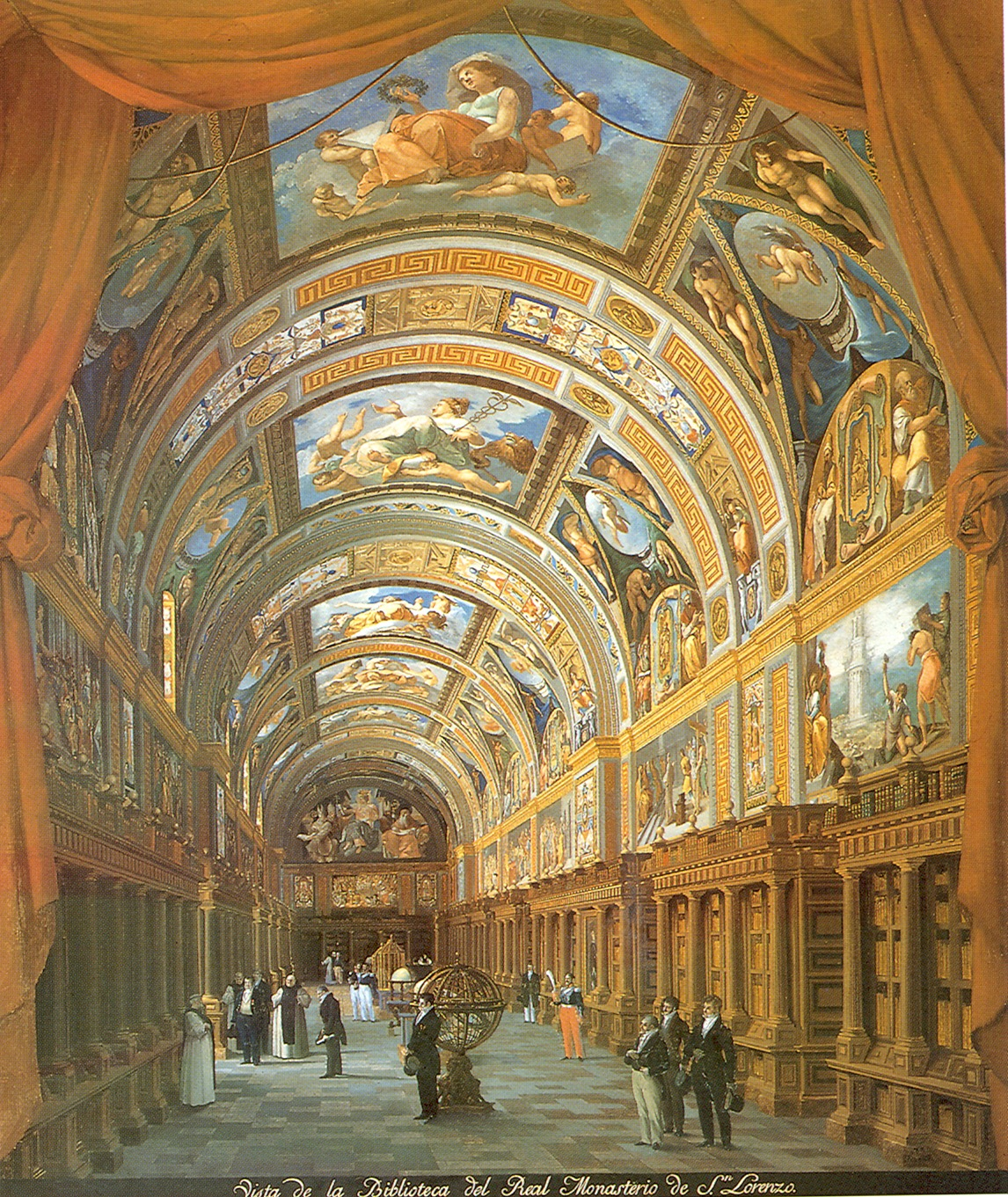 Vista de la Biblioteca del Real Monasterio (Monasterio de San Lorenzo de El Escorial, Madrid, España). Patrimonio Nacional. Pertenece a la serie Vistas de los Sitios Reales y Madrid, realizada hacia 1830 por Fernando Brambila a petición del rey Fernando VII.